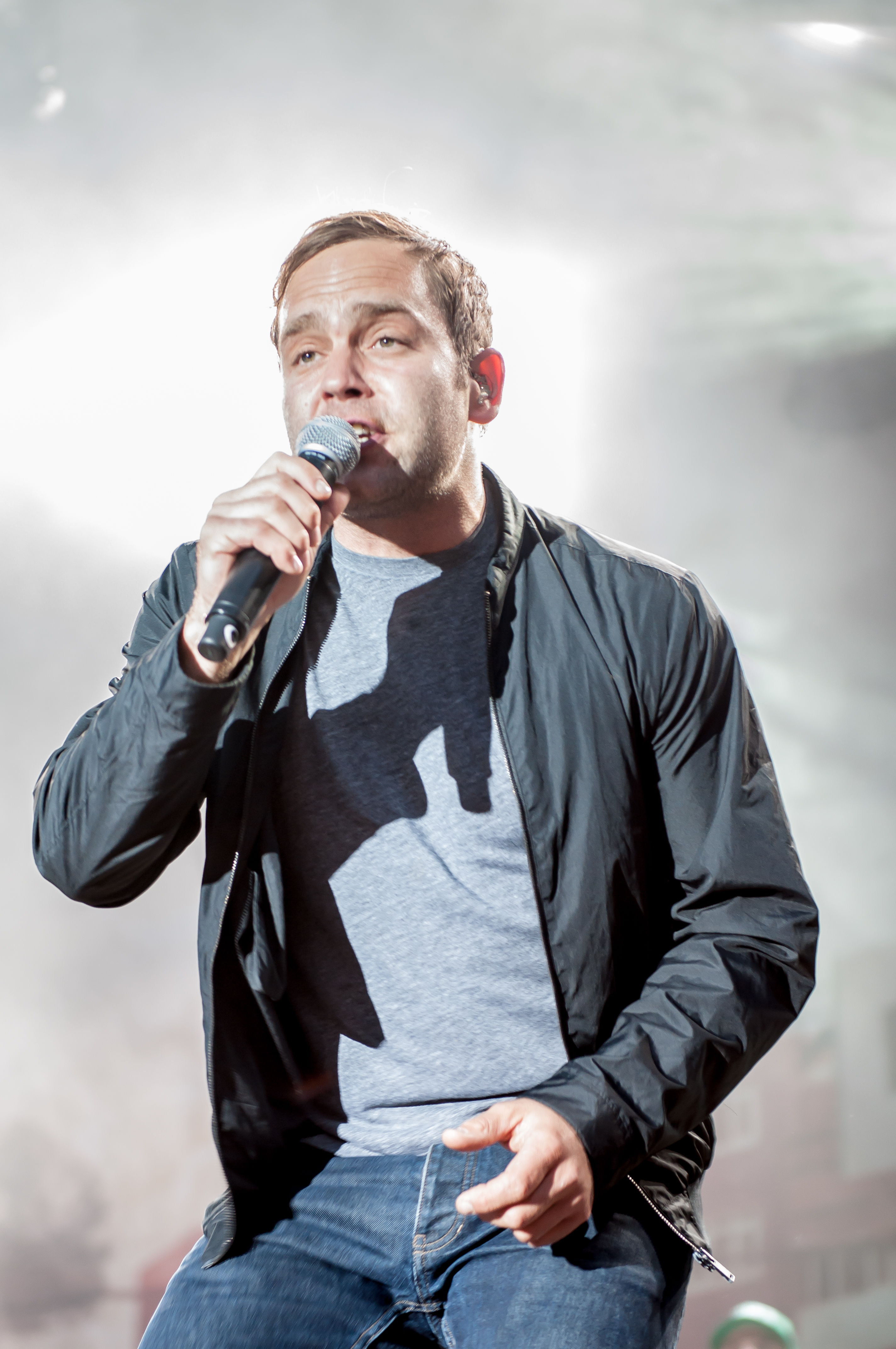 Die Band Bosse auf dem Kosmonaut Festival 2014 in Chemnitz Oberrabenstein.